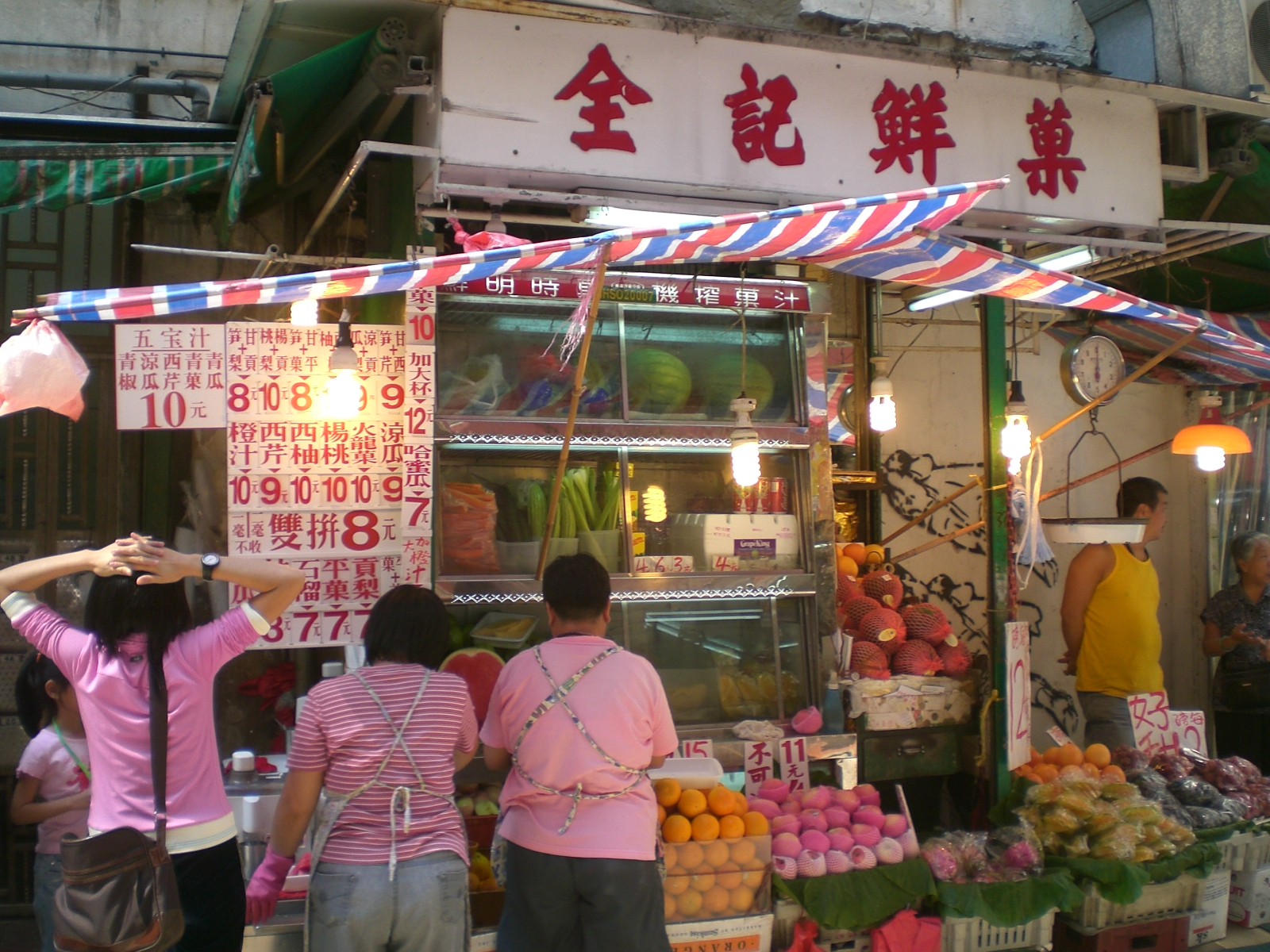 禧利街, 中西區, 上環, Hillier Street, Sheung Wan, Hong Kong